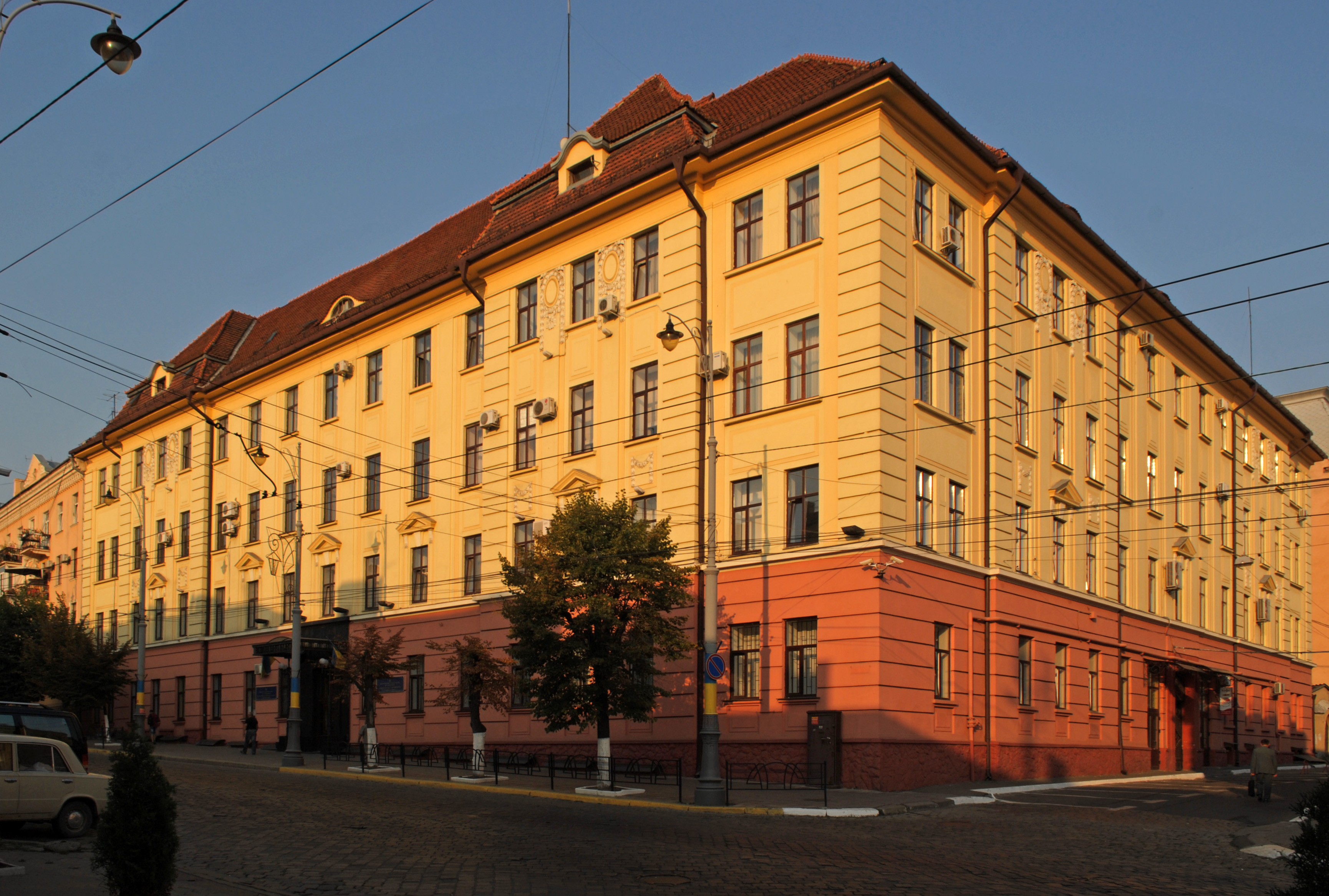 Адміністративна споруда, Чернівці, Головна, 24